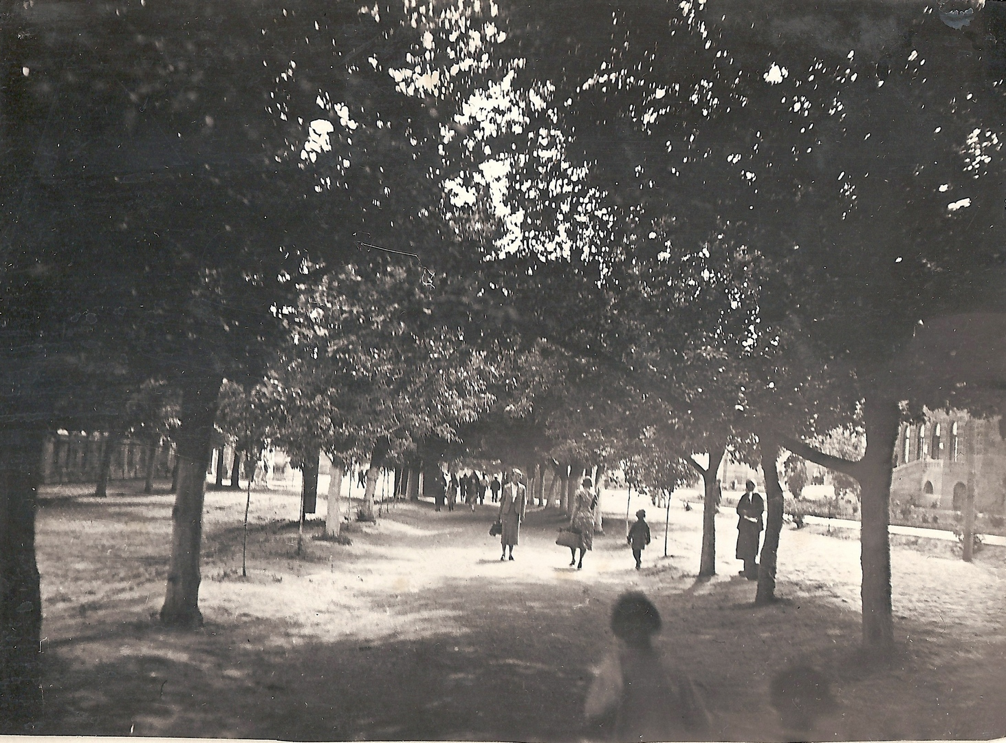 Новочеркасск, бульвар на улице Просвещения в 1938 году